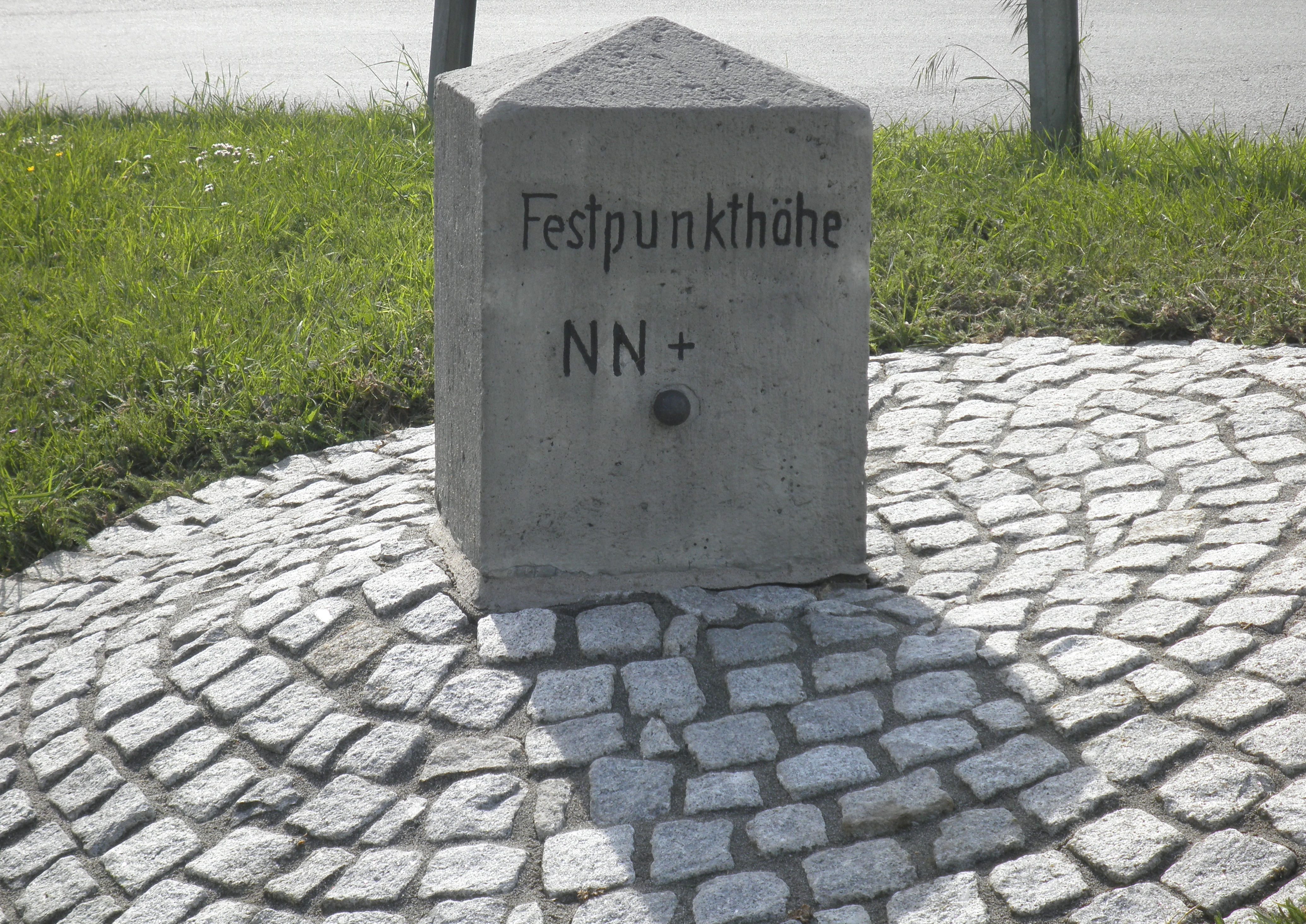 Meetpunt: 'Festpunkthöhe NN+' nabij het Spoykanaal te Kleve-Wardhausen, Duitsland